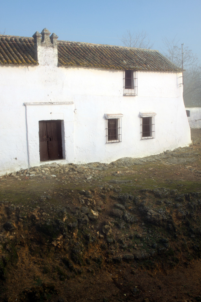 Antigua Casa Consistorial de Gandul. Provincia de Sevilla. España.